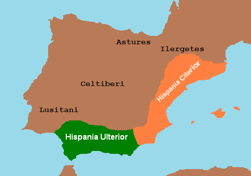 Prima Hispaniae provincialis divisio